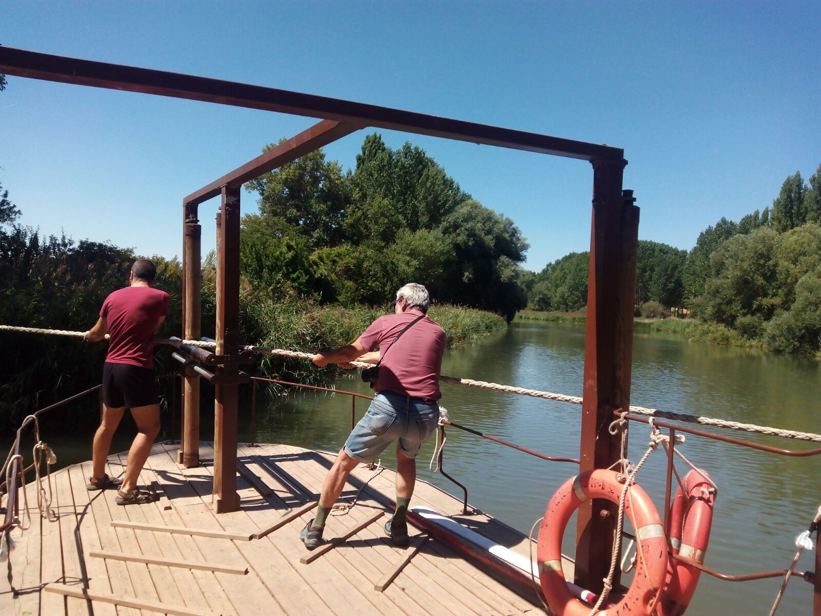 Puente Barca sobre río Pisuerga.